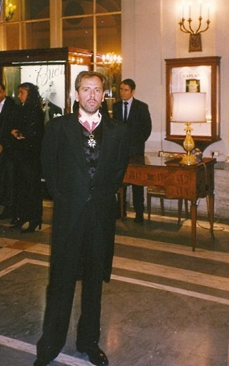 Daniel Herrendorf impuesto de la Orden de la Jarretera